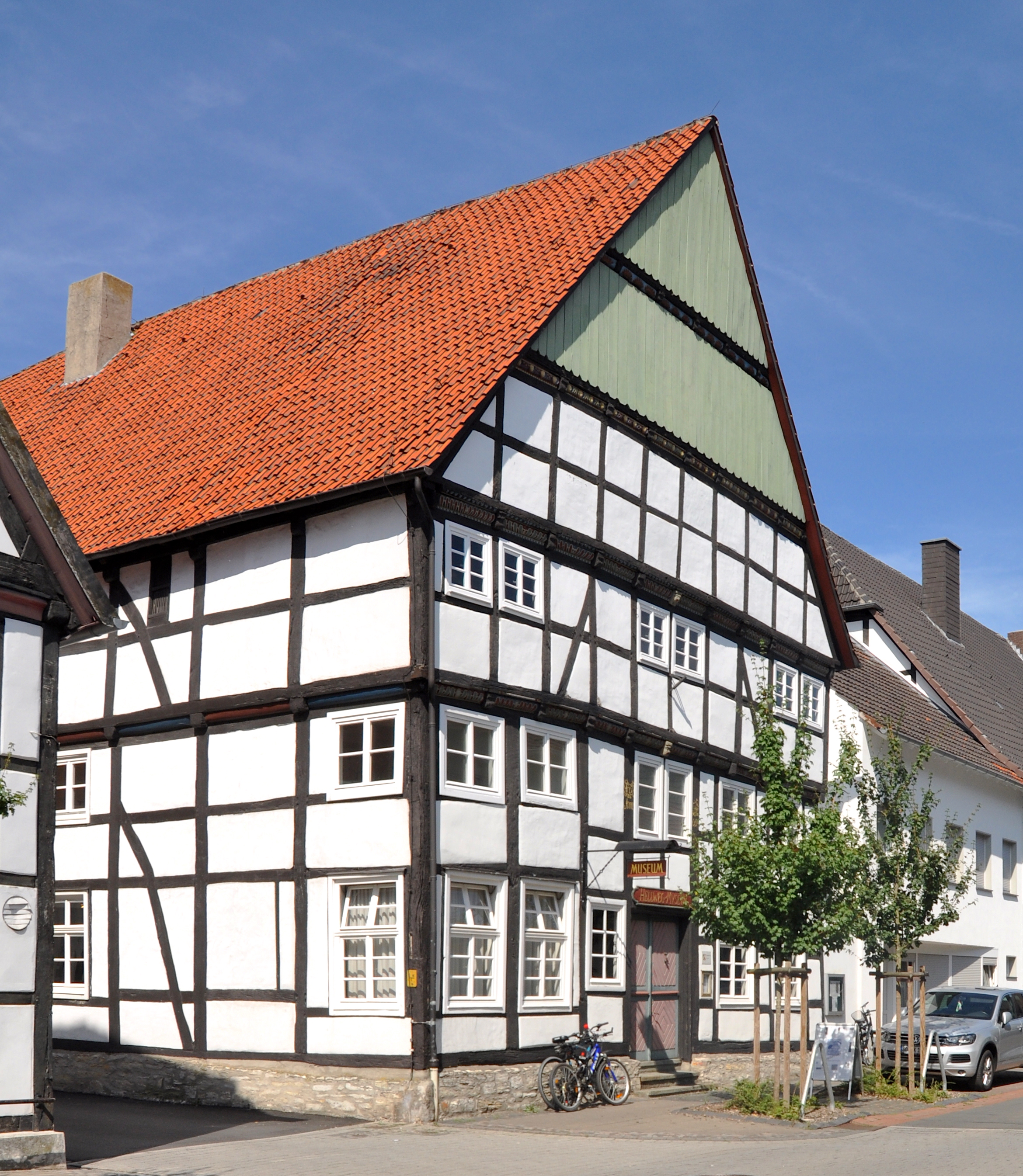 Denkmalgeschütztes Fachwerk-Giebelhaus Hellweg 13 in Geseke, Heimatmuseum